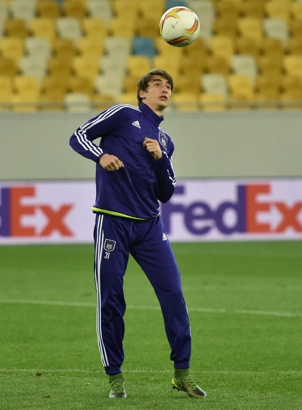 Филип Джуричич - футболіст Андерлехта